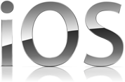 iOS logo